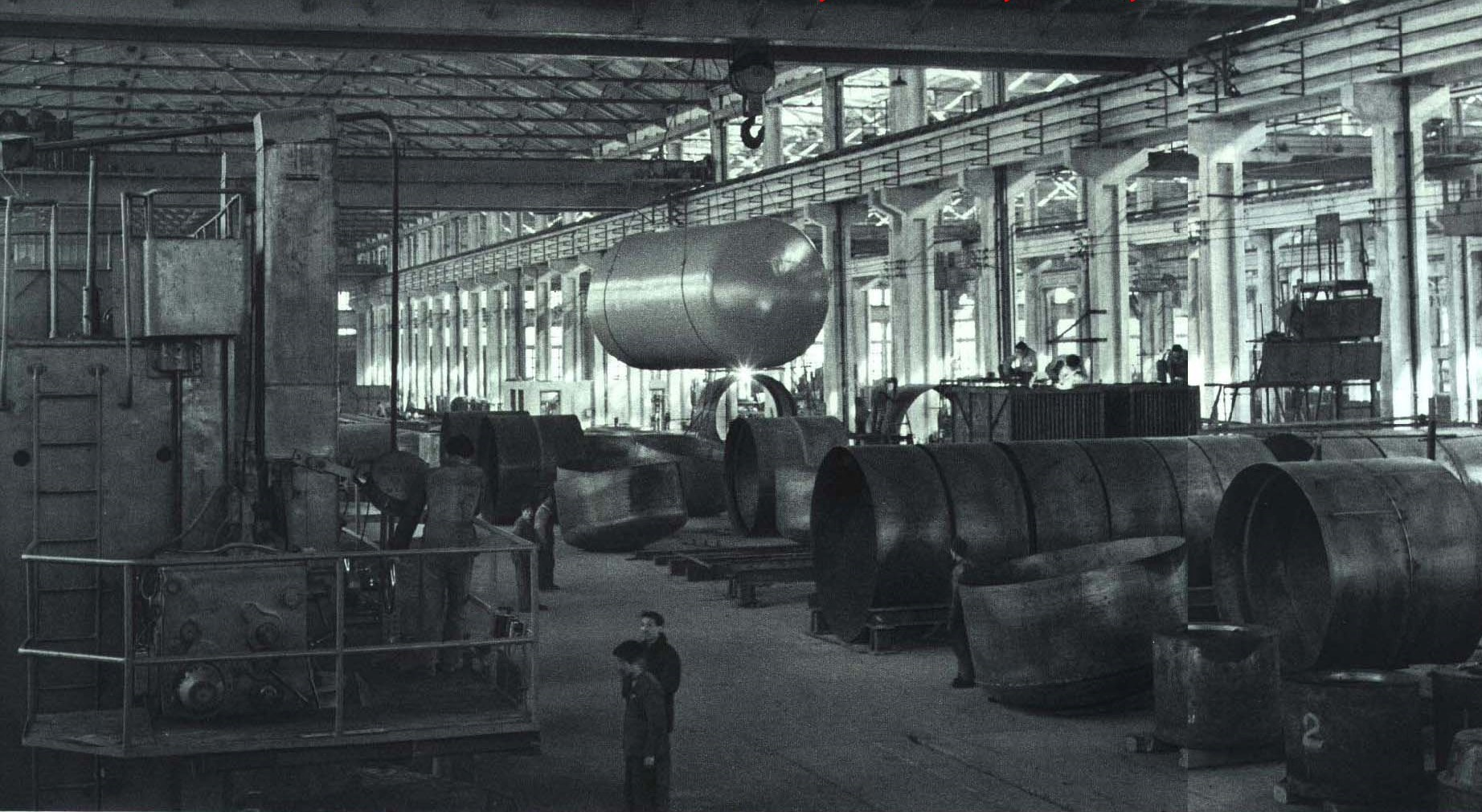 1964-05 1964年 上海锅炉厂